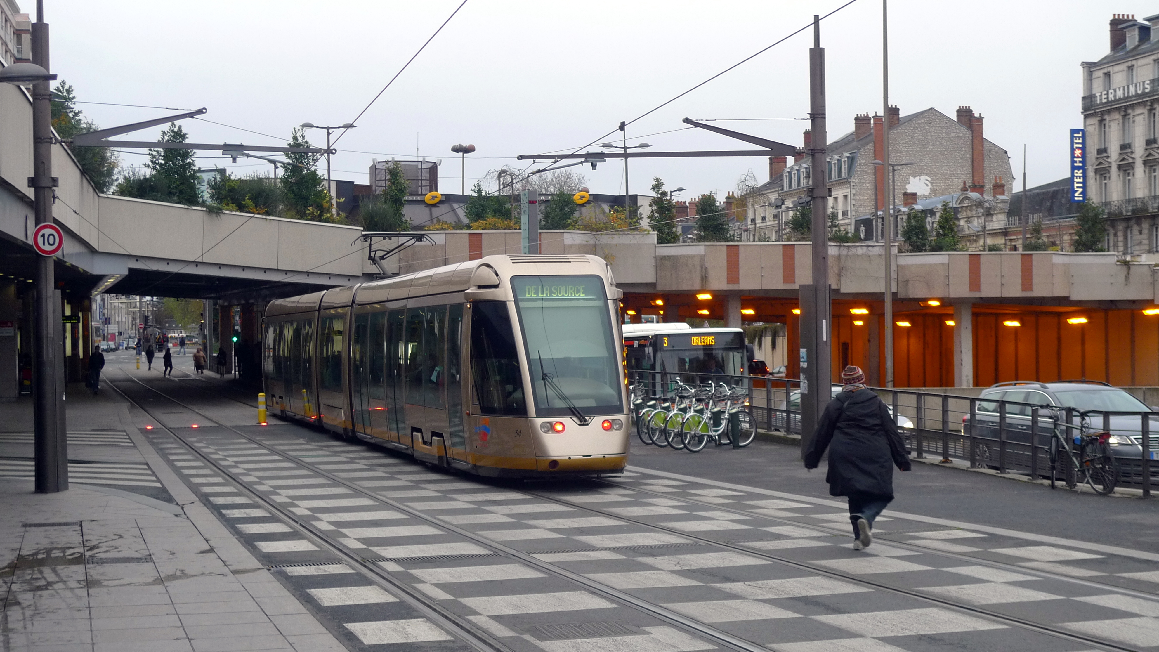 Bus du réseau TAO (ex-SEMTAO), en 2009.